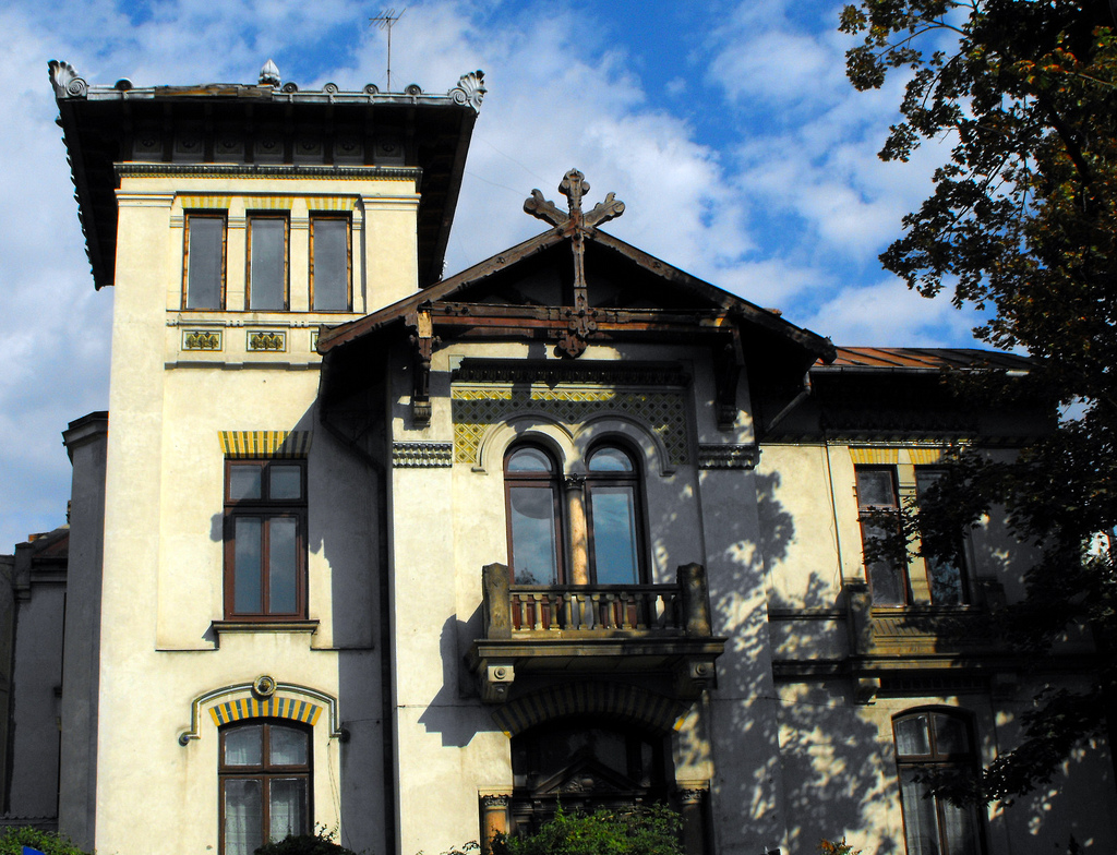 Casa Elie Radu